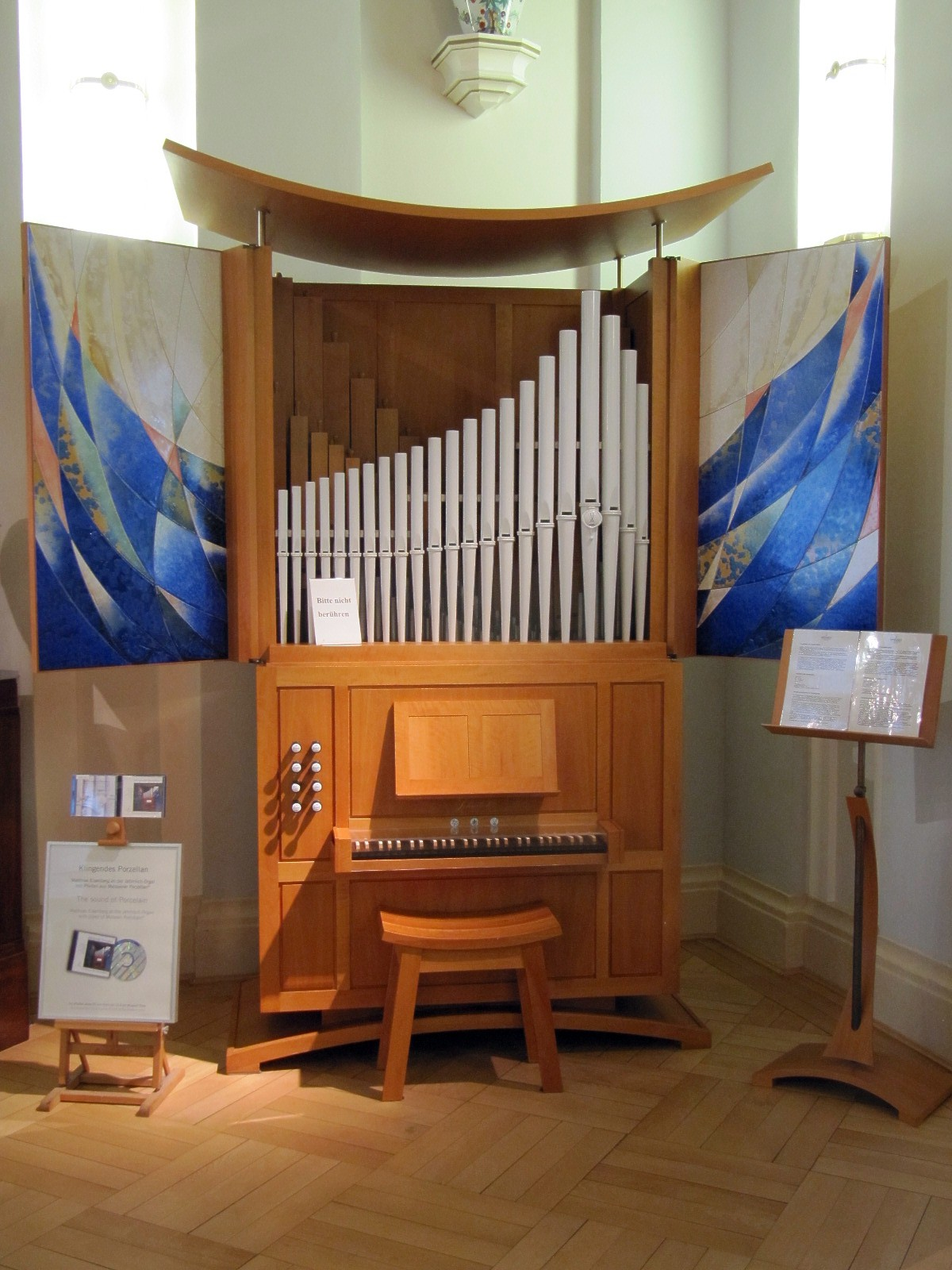 Orgelpositiv mit 22 Porzellanpfeifen im Prospekt, erbaut von Orgelbau Jehmlich in Dresden im Jahr 2000